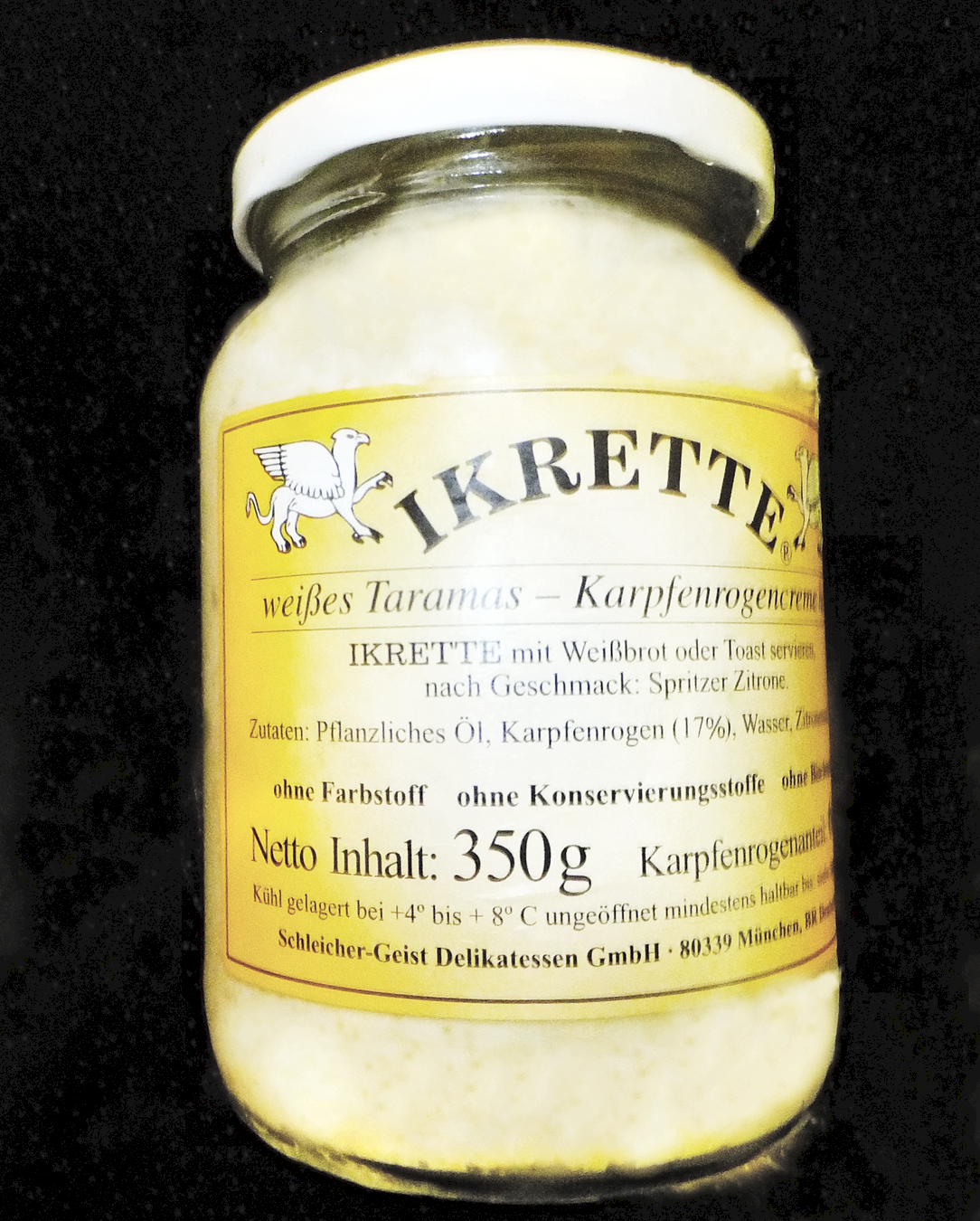 Borcan cu icre batute